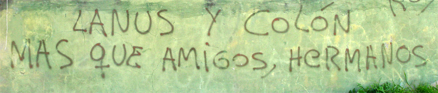 Pintada en la costanera santefecina